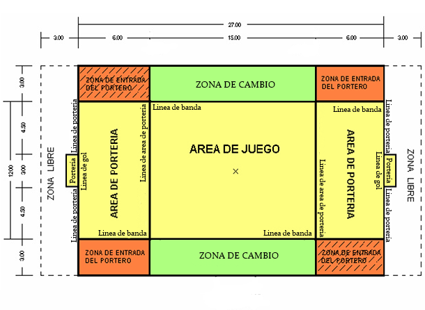 Dimensiones de un campo de balonmano playa